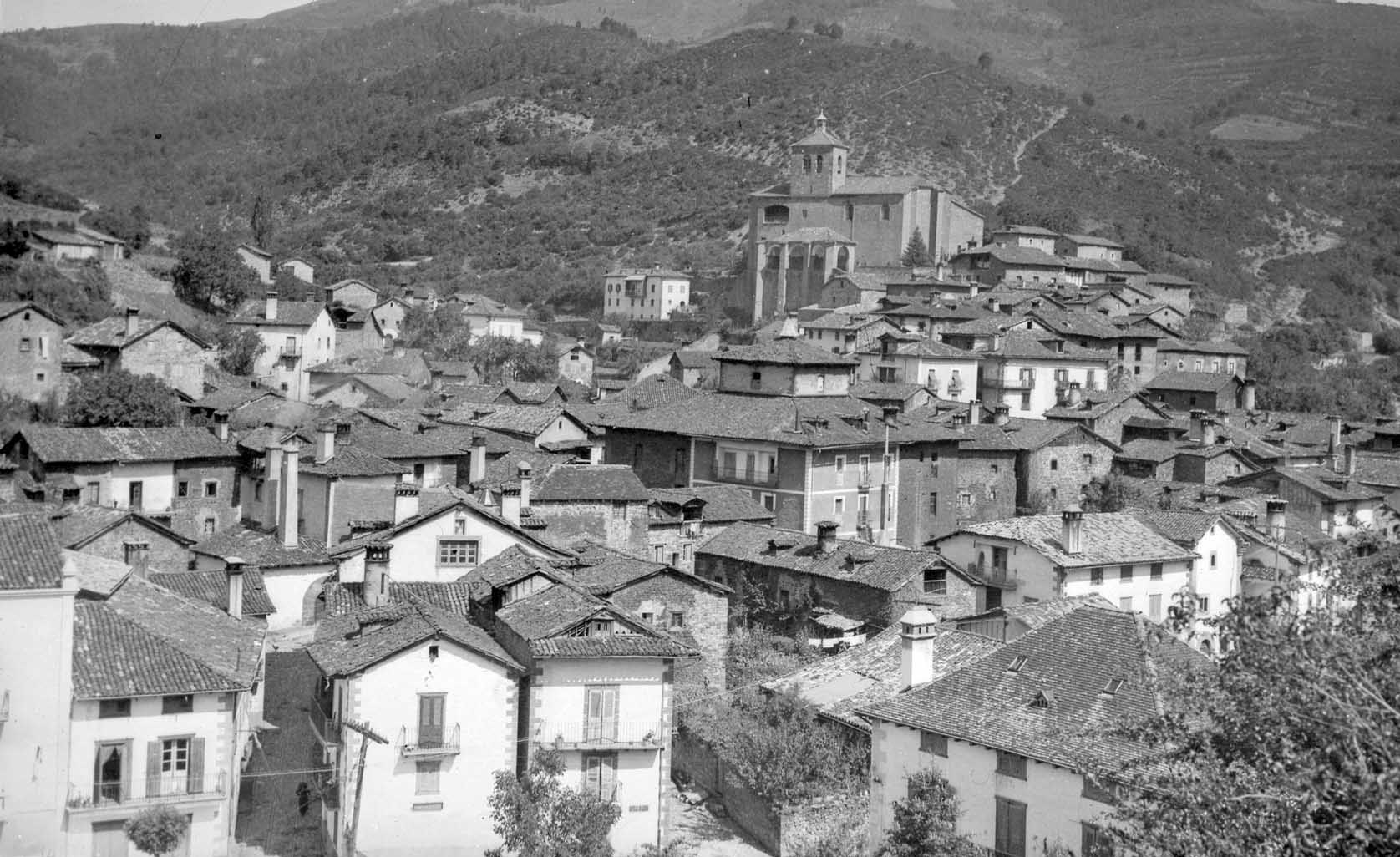 Erronkariko ikuspegi orokorra